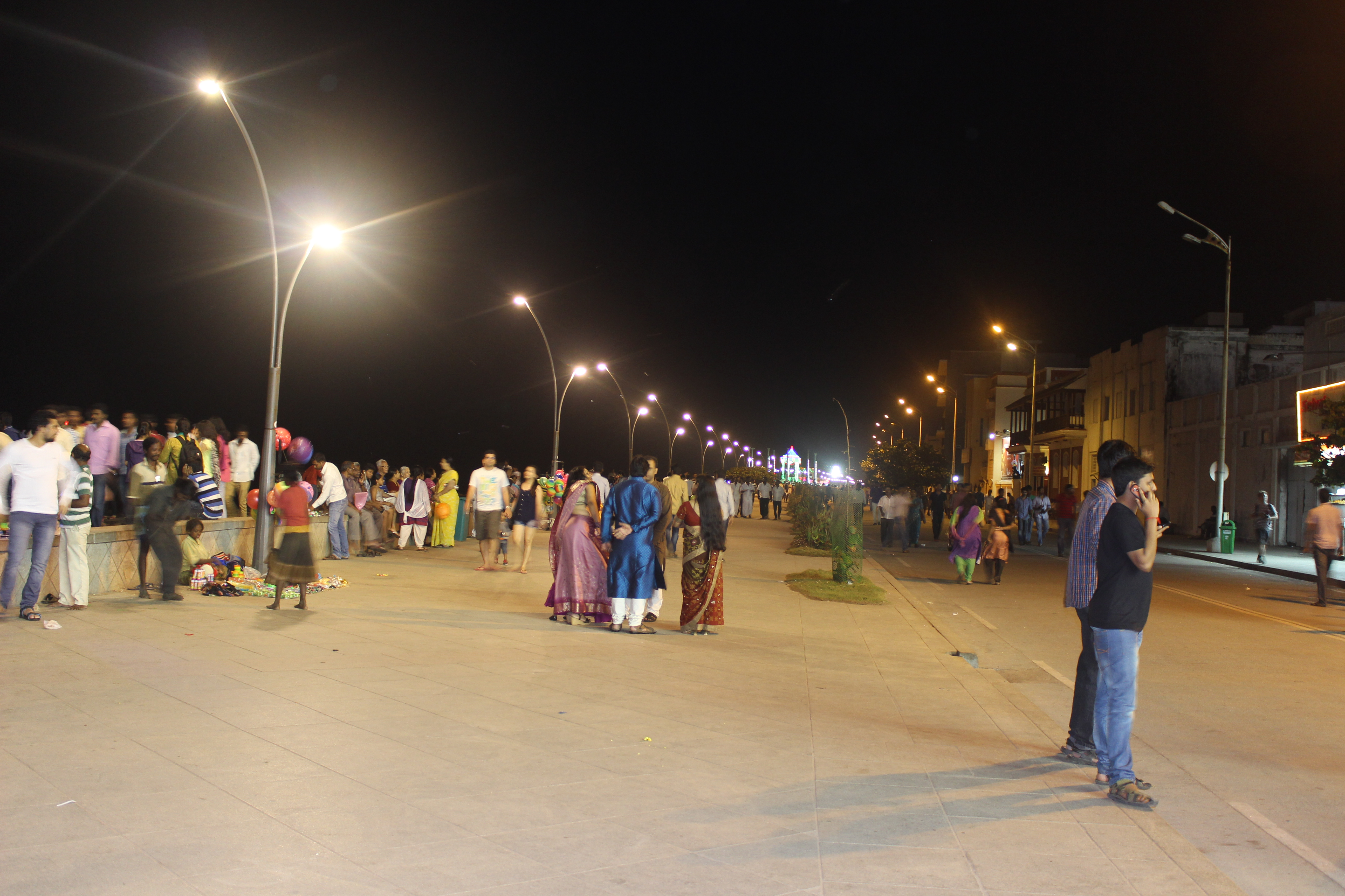 இரவு நேரத்தில் புதுச்சேரி கடற்கரை